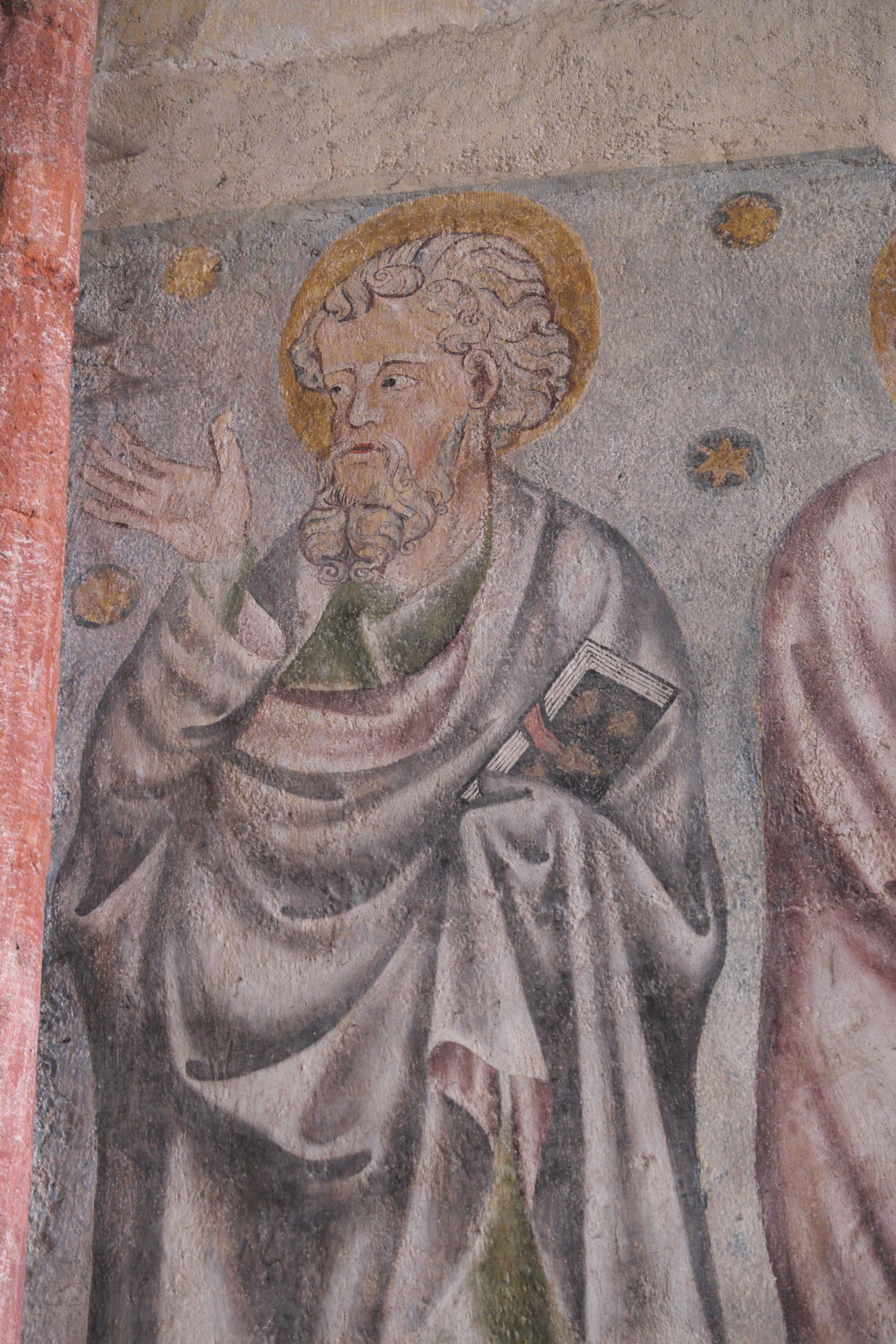 Katholische Pfarrkirche, ehemalige Stiftskirche, Saint-Cerneuf in Billom im Département Puy-de-Dôme (Auvergne-Rhône-Alpes), Chapelle du Rosaire, Wandmalerei aus dem 14. Jahrhundert